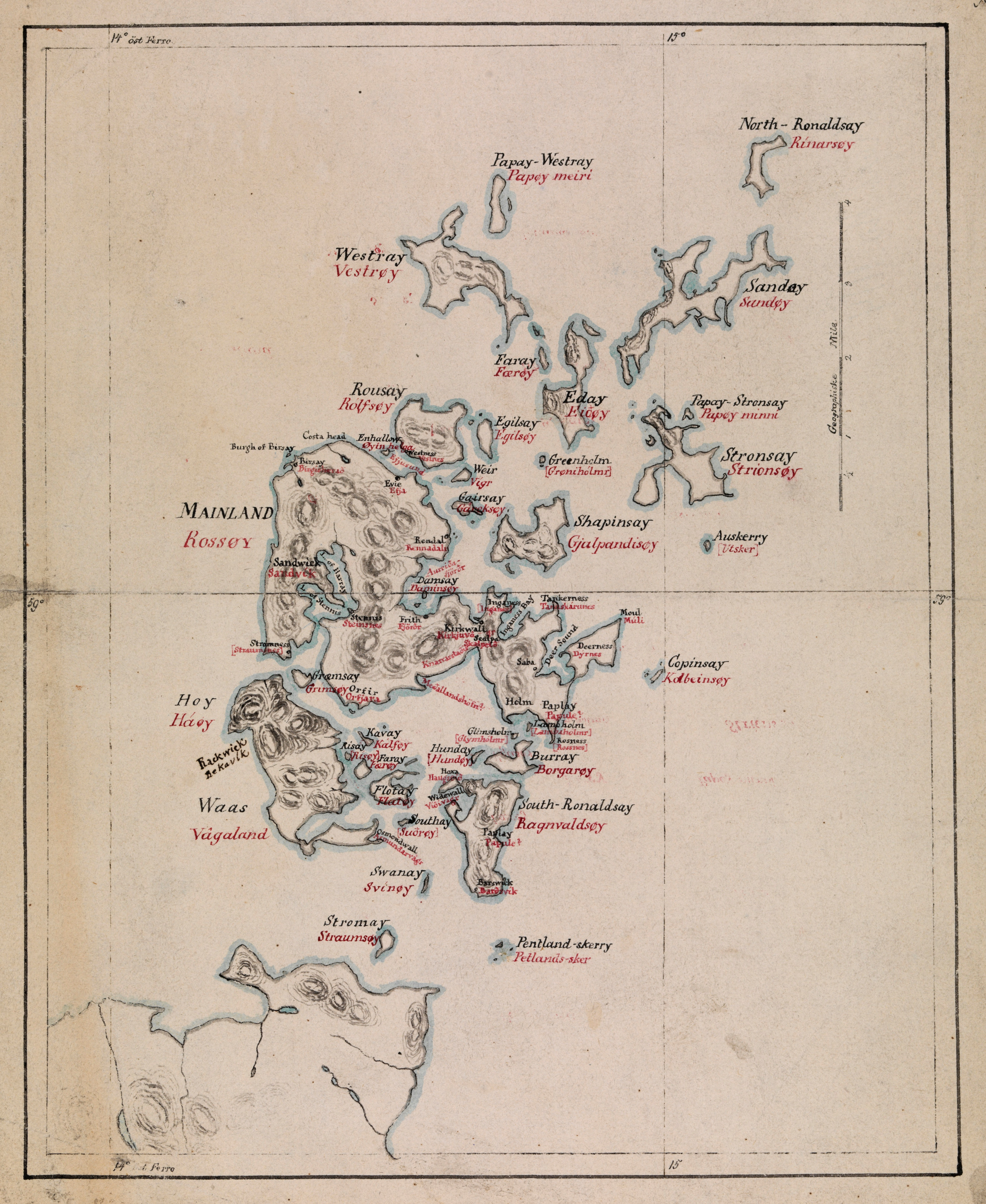 Kart fra Nasjonalbibliotekets kartsamling. Kartet er gitt ut i Håndtegnet (ca 1850) og viser Orknøyene.